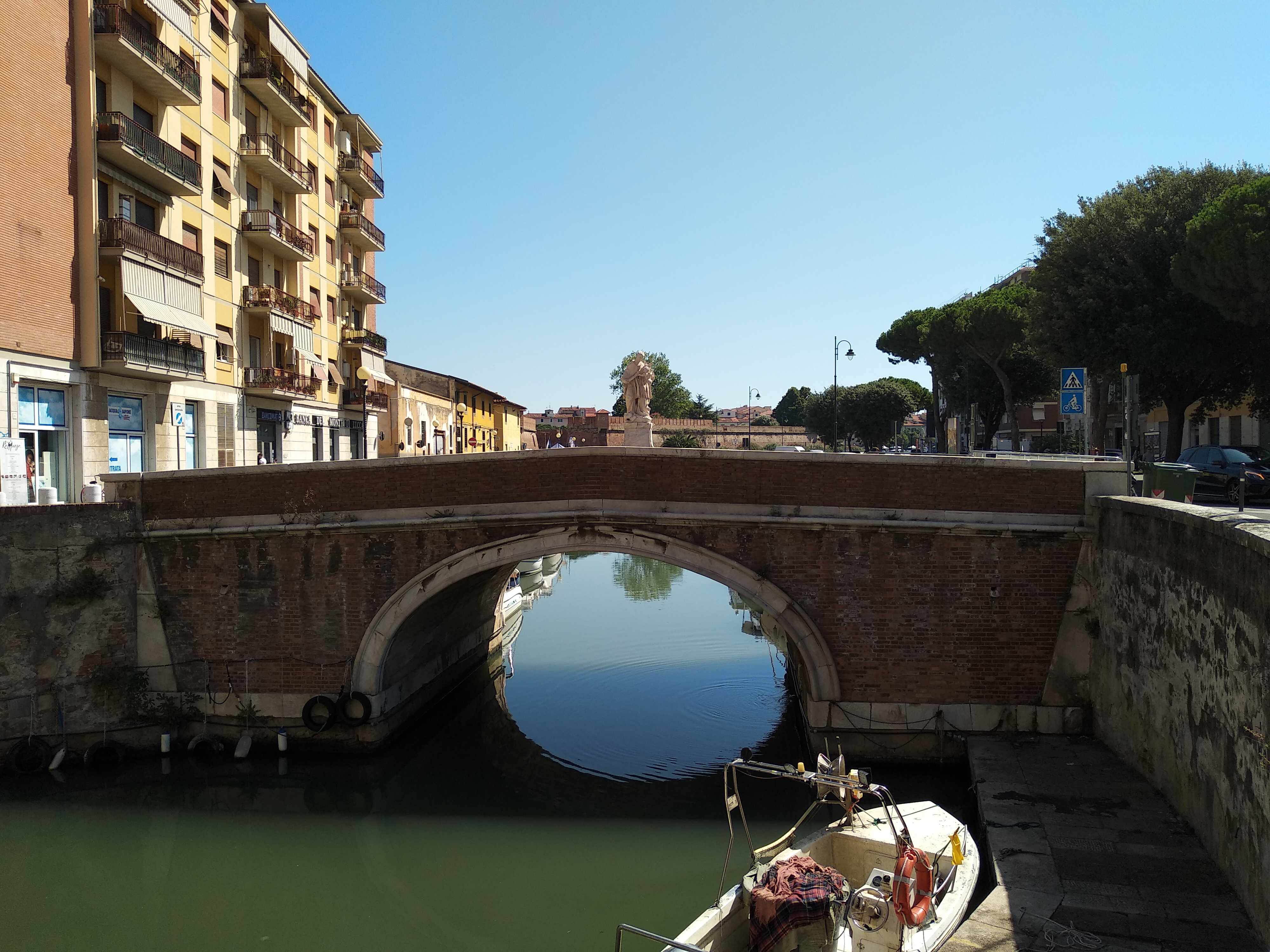 ponte